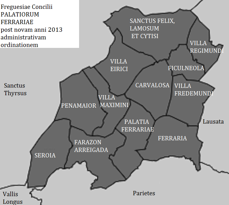 Concilii Palatiorum Ferrariae freguesiae post novam anni 2013 ordinationem administrativam.